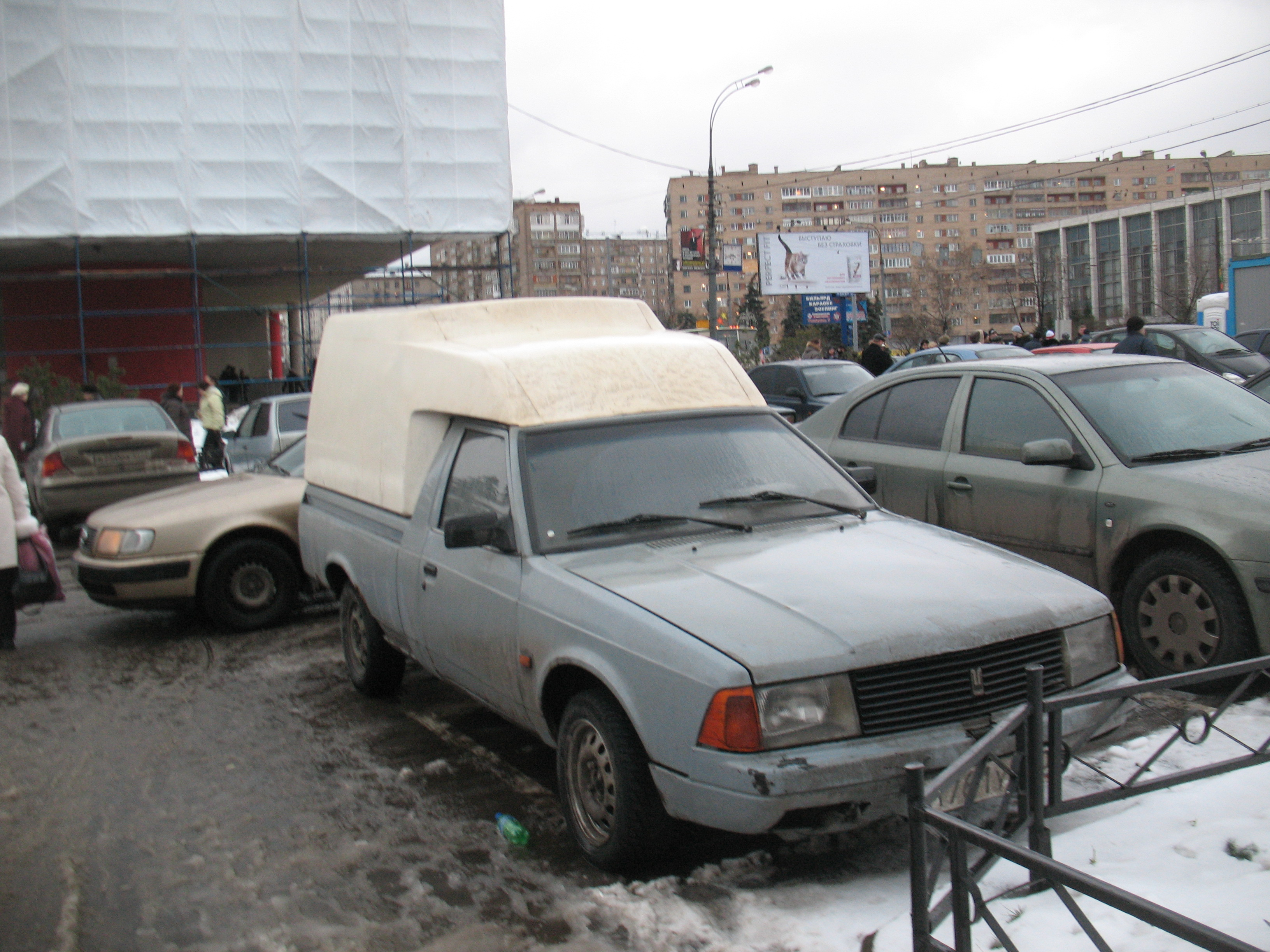 Москвич-2335 Пикап в Москве.